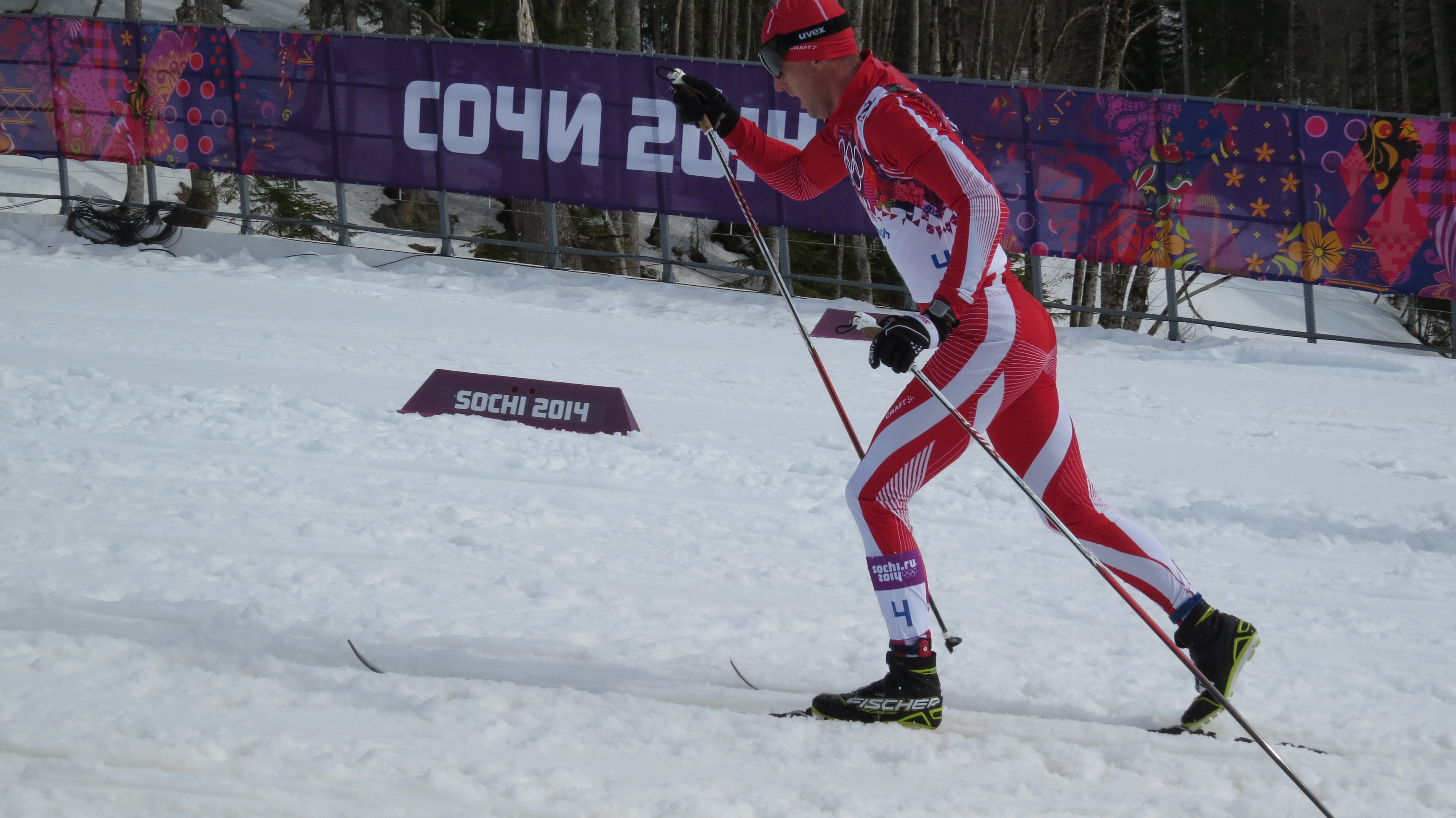 Лыжные гонки на зимних Олимпийских играх 2014 — 15 км классическим стилем (мужчины)